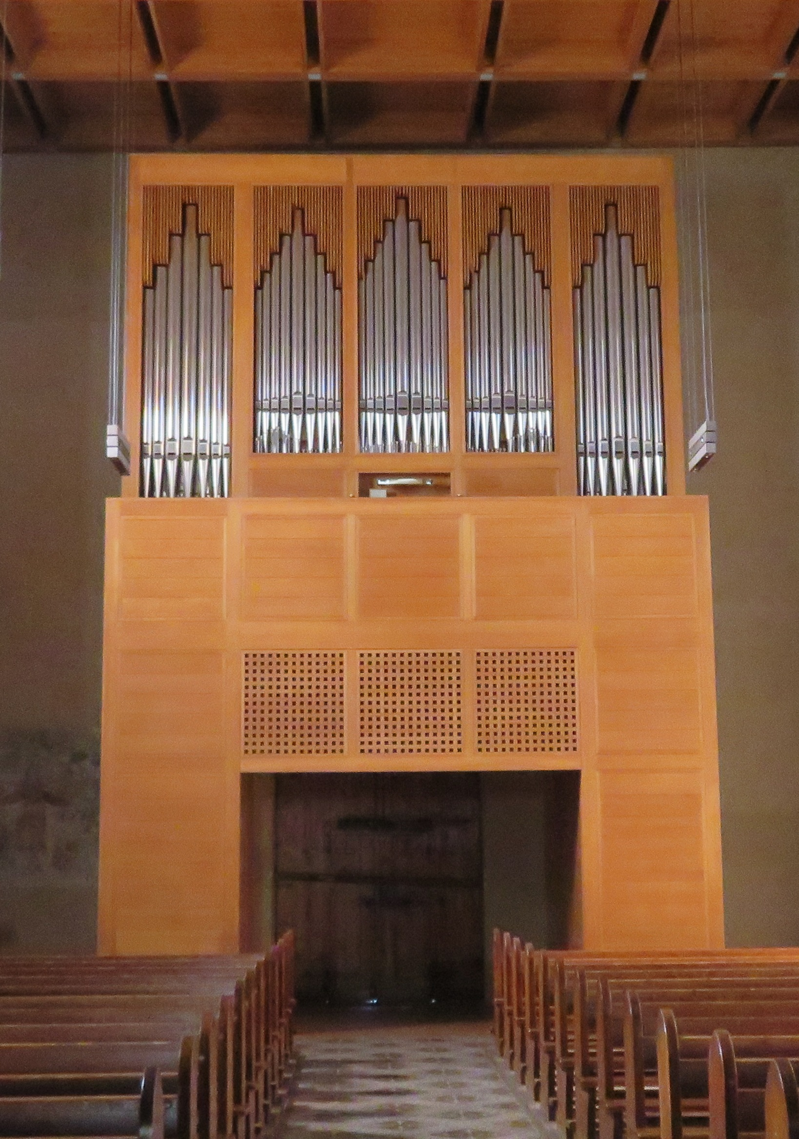 Orgel von Mathis Orgelbau, erbaut 1994 für die Kirche Santa Maria della Misericordia in Ascona, Tessin, Schweiz (Ausschnitt)